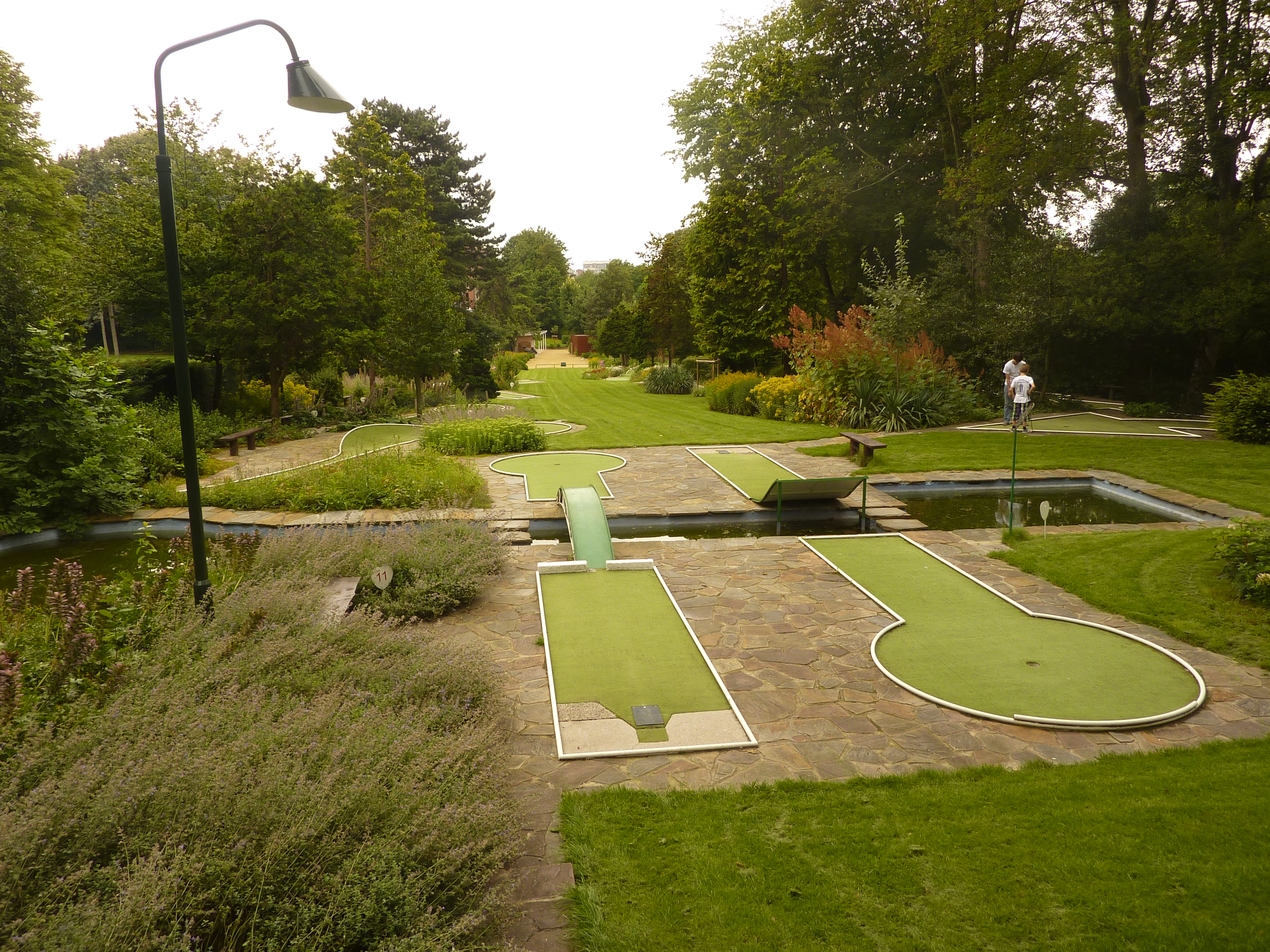 Minigolf de Schaerbeek, Bruxelles, Belgique.